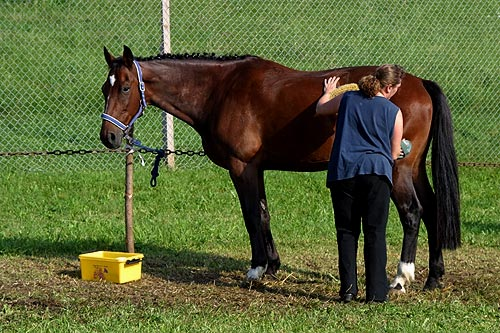 Marché-Concours 2004: Vorbereitungen für den Umzug